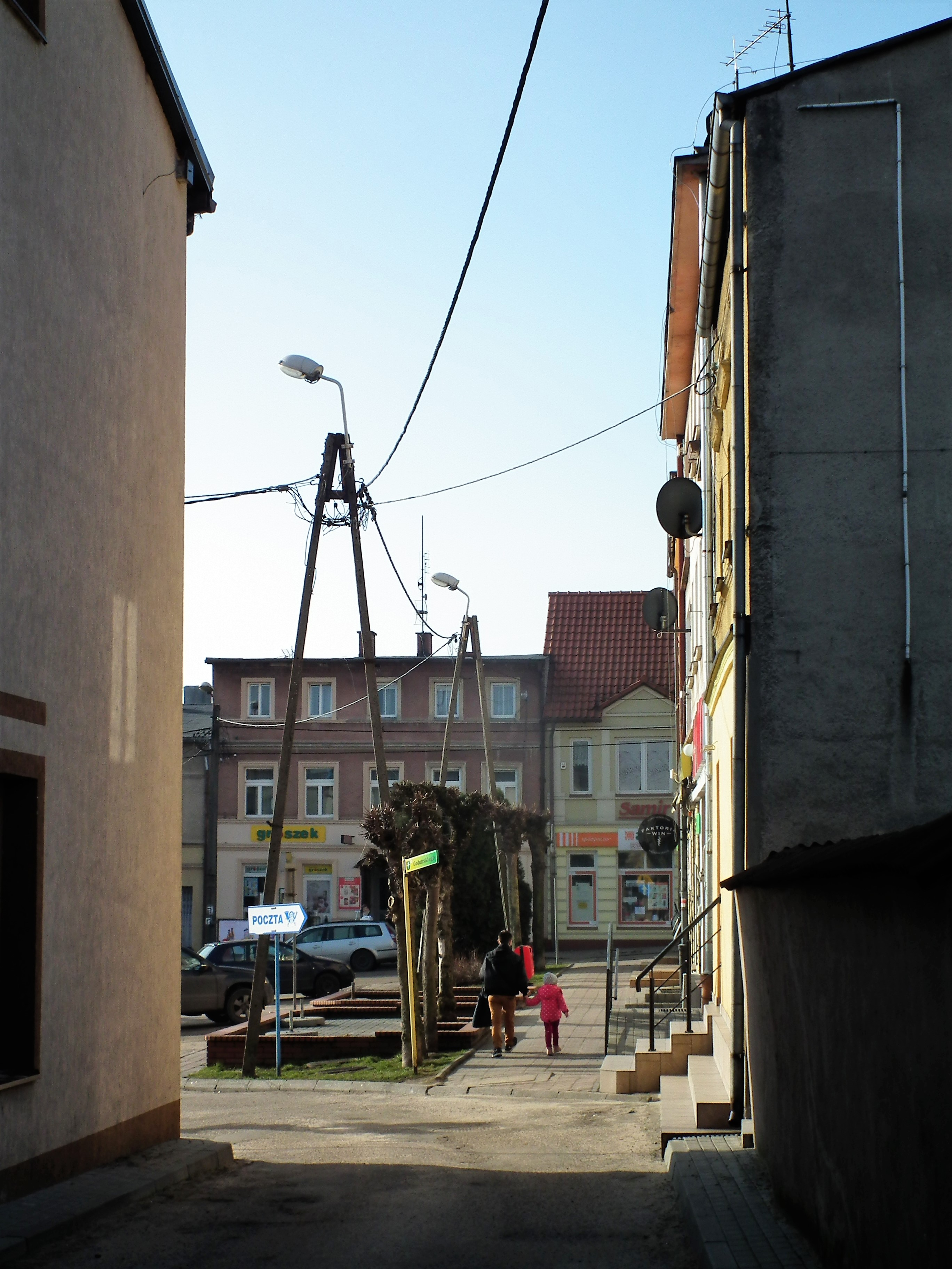 Widok miejski z Górzna.